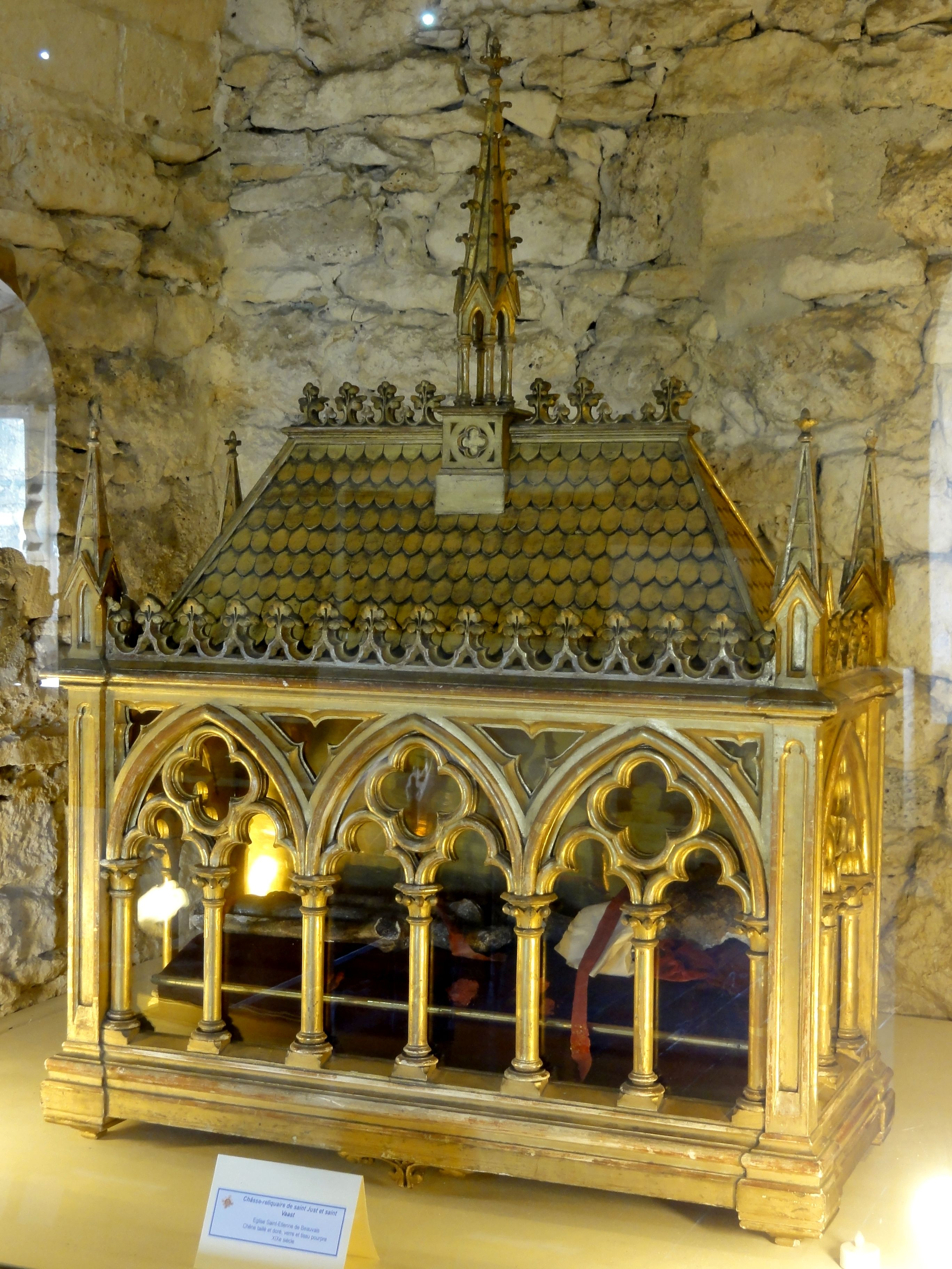 Xhâsse de saint Just et de saint Vaast, bois doré, XIXe s.